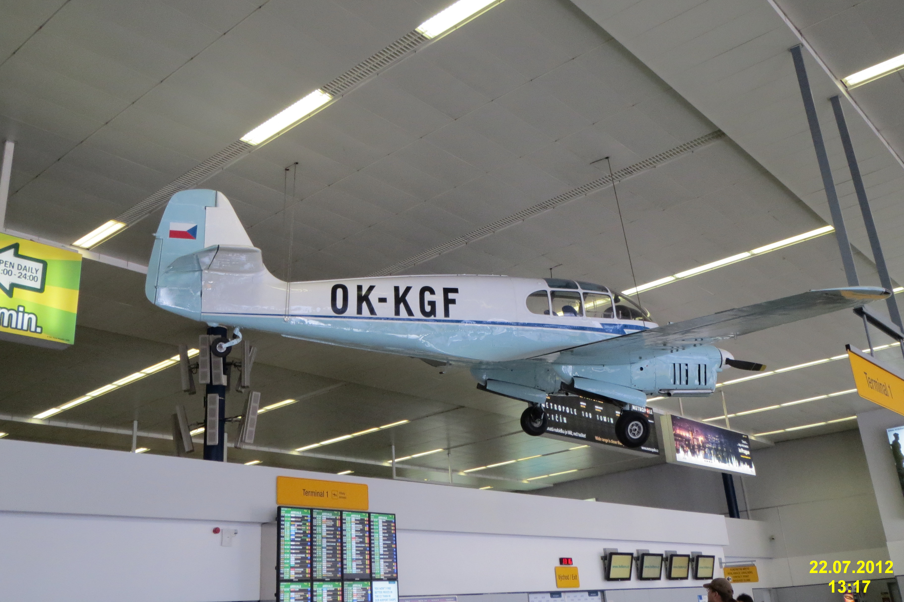 Arrivals, Ruzyně